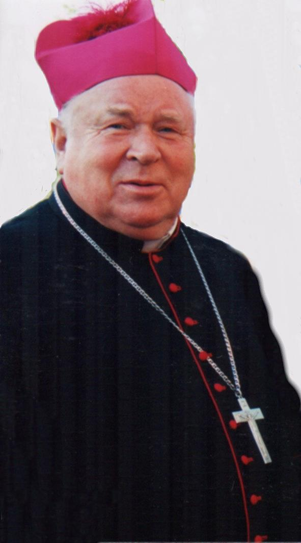 Mieczyslaw Jaworski, polský biskup